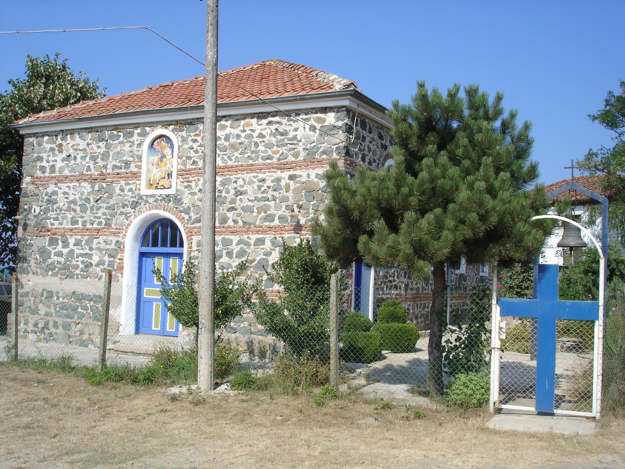 "St. George" Church in Sinemorets, Bulgaria